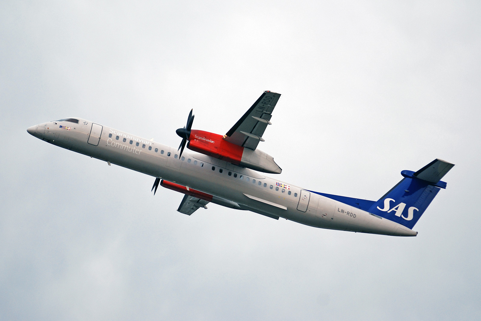 Bombardier Dash 8-Q402 Amsterdam schiphol EHAM (17-02-2007)